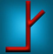 Kızık boyu Tamgası